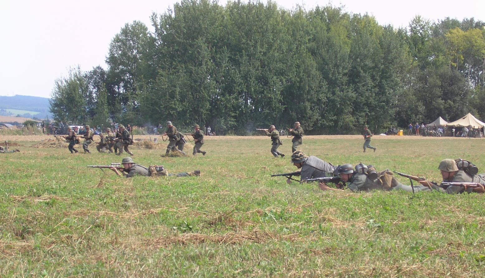 Útok pěchoty (Kursk 2006) Reenacting